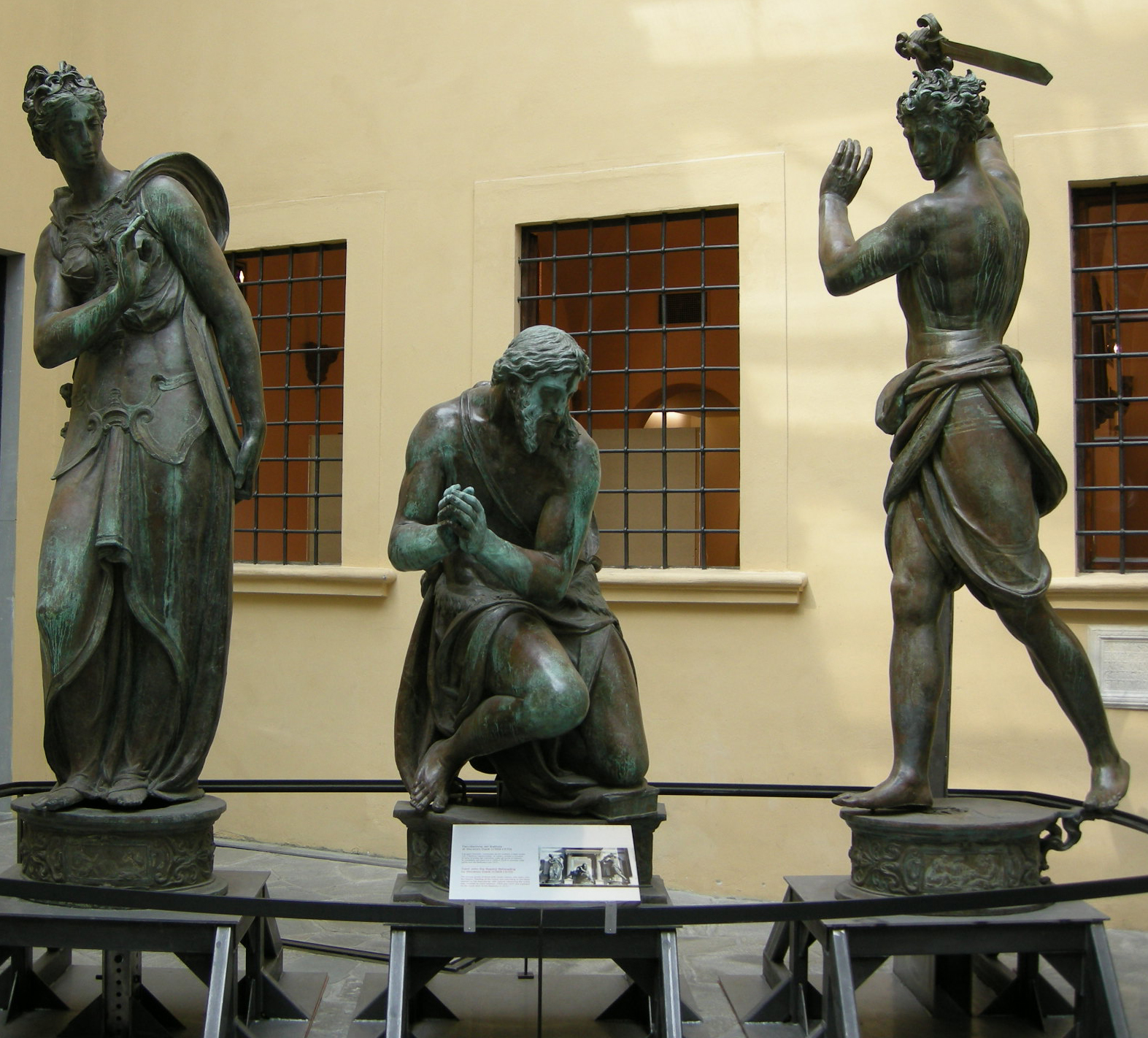 Vincenzo danti, decollazione del battista, dal battistero, 1569-1570